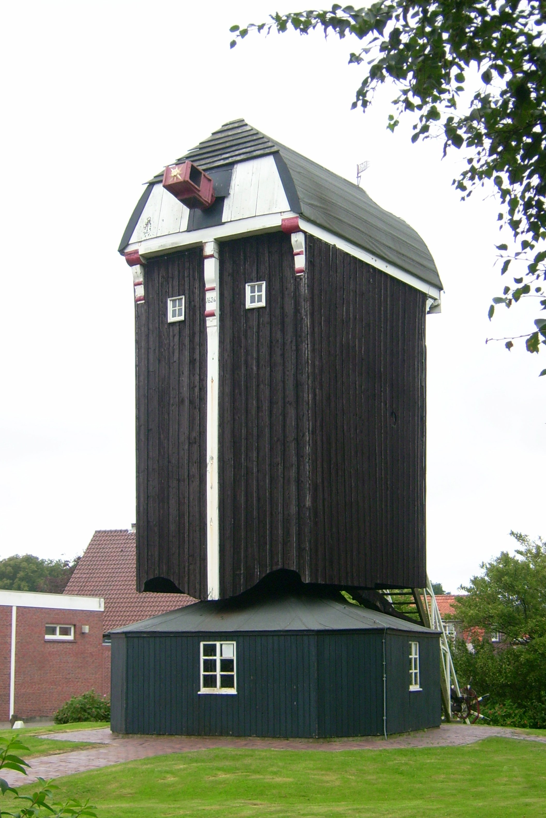 Blockwindmühle in Dornum